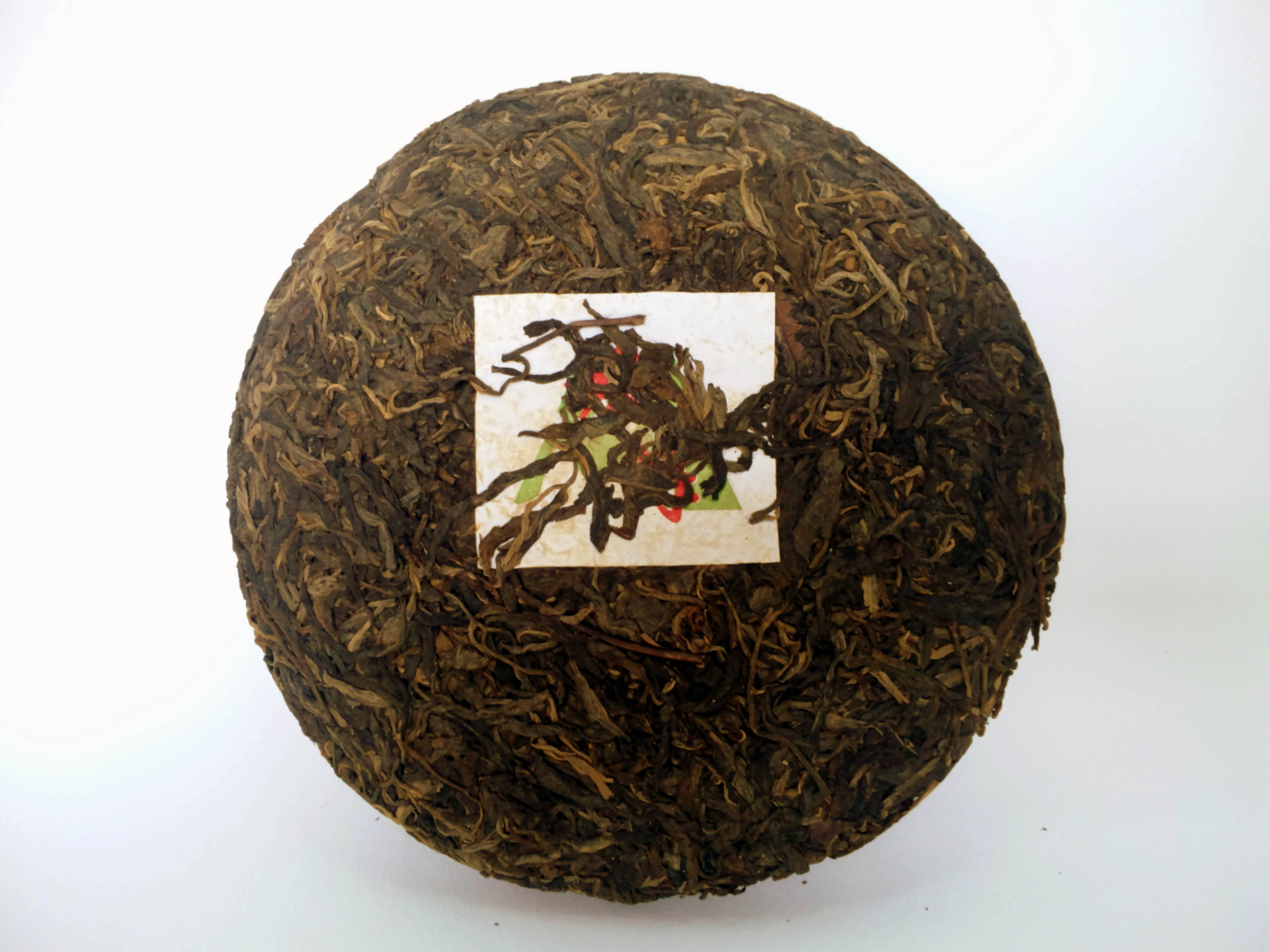 七子餅茶を表側から撮影